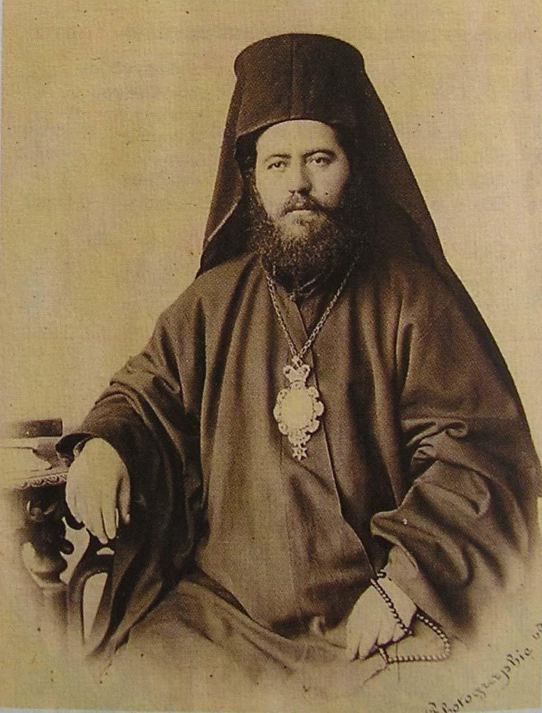 Апостолос Христодулу